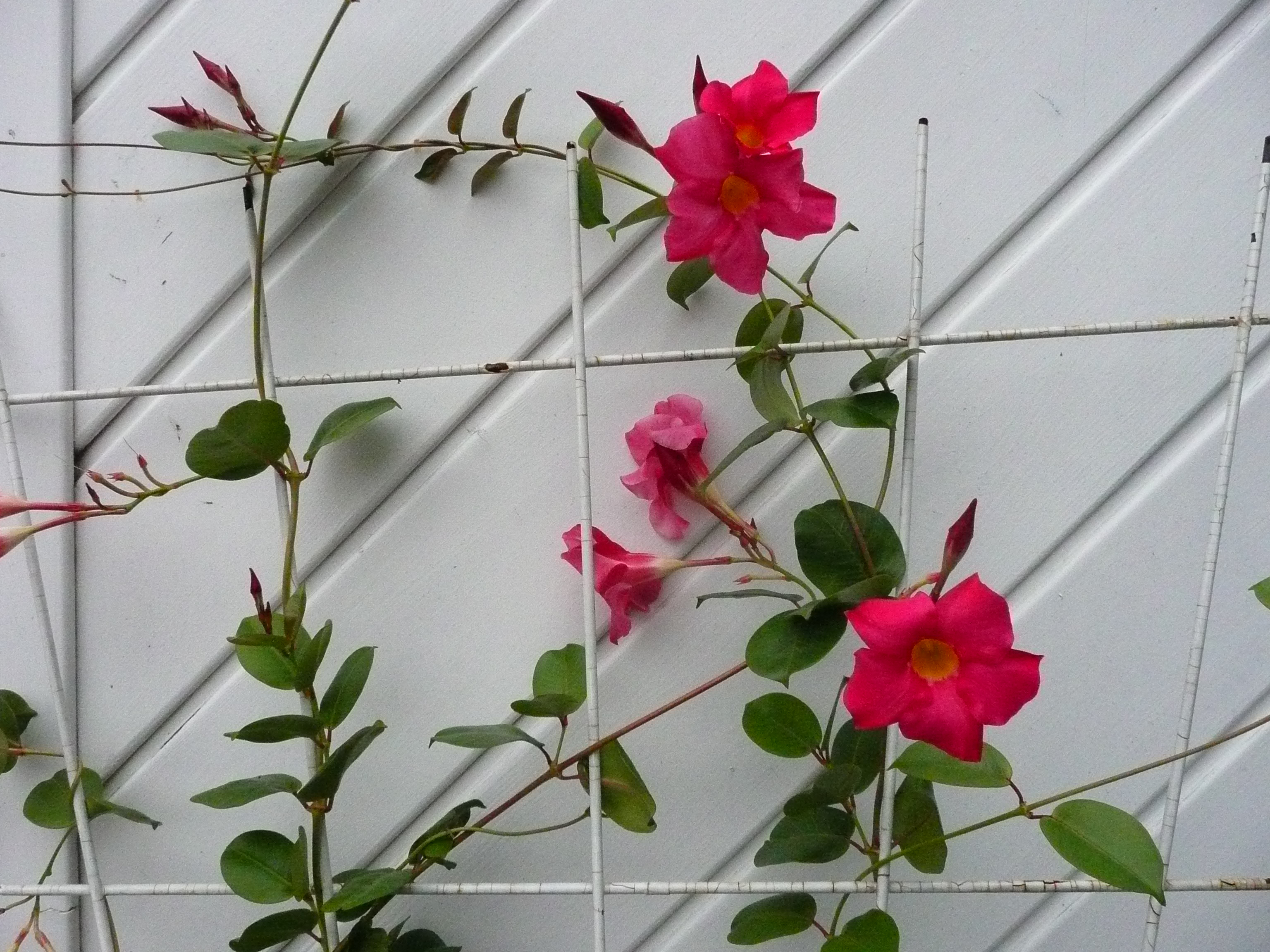 Dipladenia sanderi